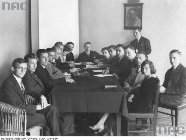 Członkowie Rady Naczelnej Związku podczas obrad. W środku widoczny Jan Grzywaczewski. Z lewej od góry do dołu widoczni: Januz Rakowski, Lipińska, Szeleźniak, Sergialis, Klukowski, Bartoszczyk, Łuczyński i Szulc. Z prawej od góry do dołu widoczni: Pogucki, Ostrowski, Ursus-Siwiłło, Szper, przewodniczący Wydziału Wykonawczego Związku Tomasz Piskorski, Tadeusz Żenczykowski i Maria Piskorska.